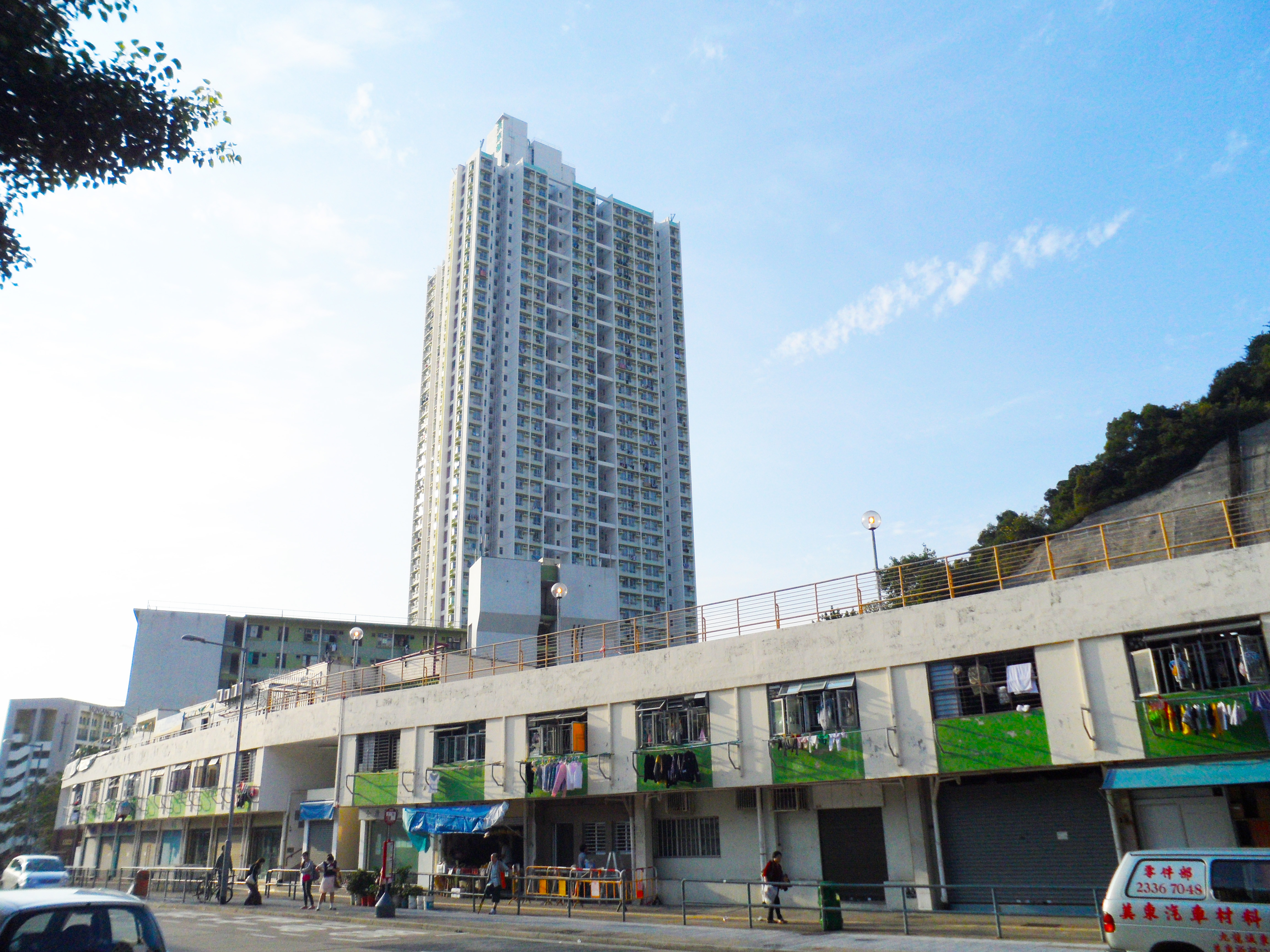 美東邨各座樓宇